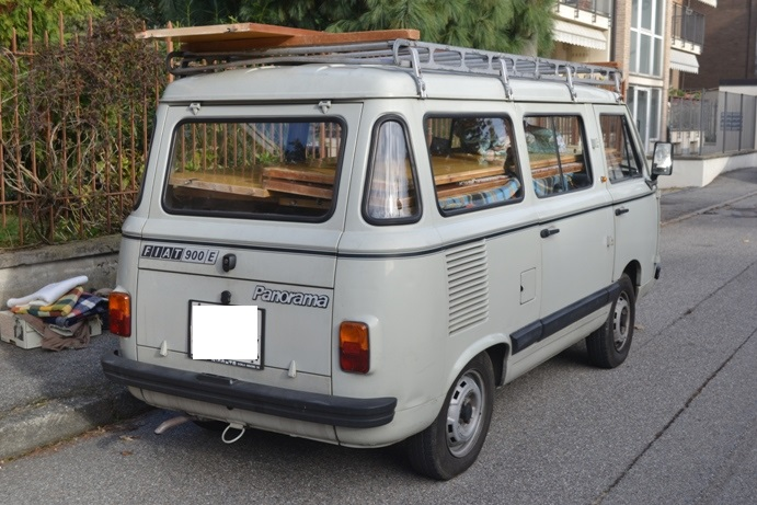 Fiat 900E d'epoca